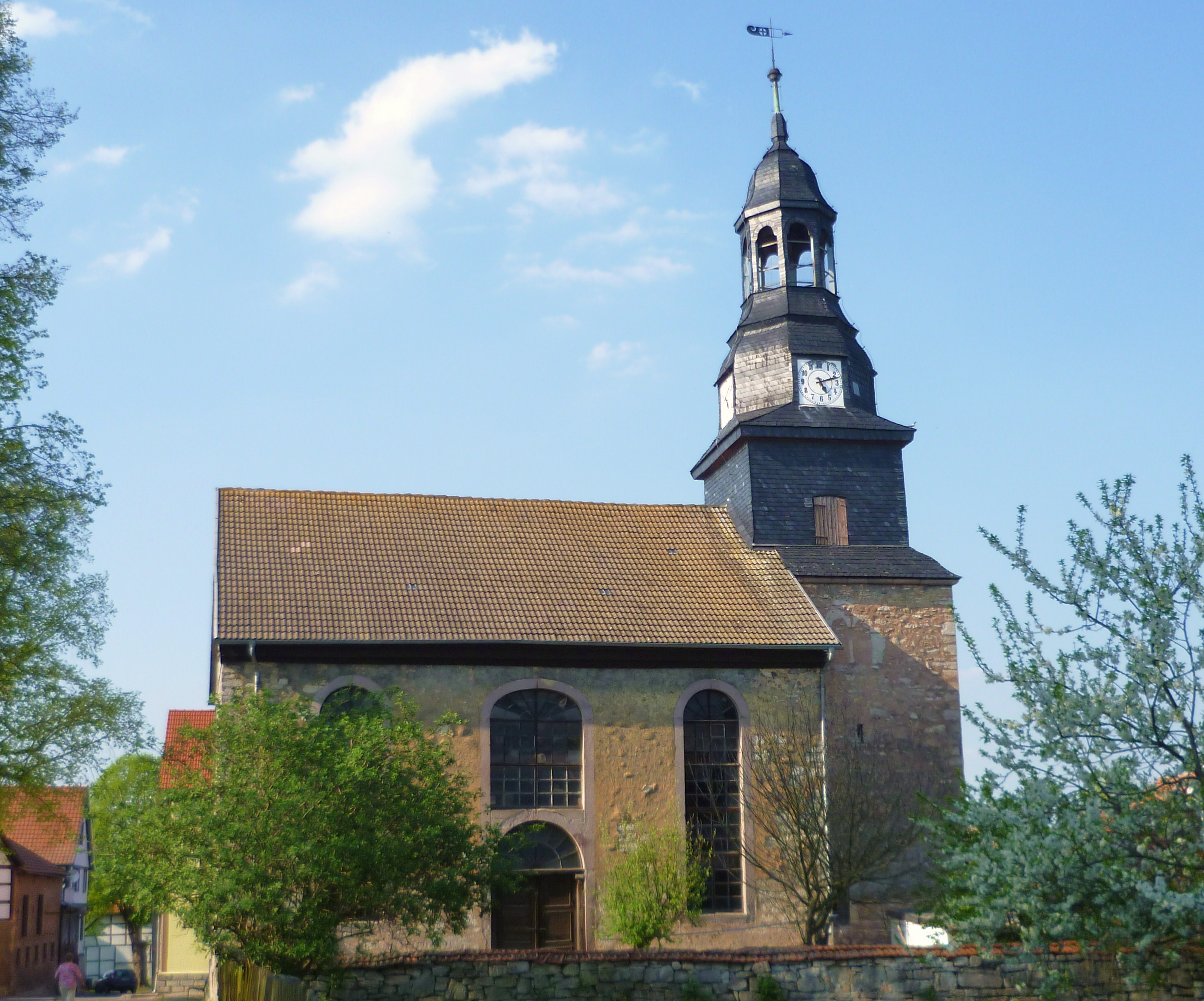 Die Kirche im Ortsteil Himmelsberg/Sondershausen (Thüringen).